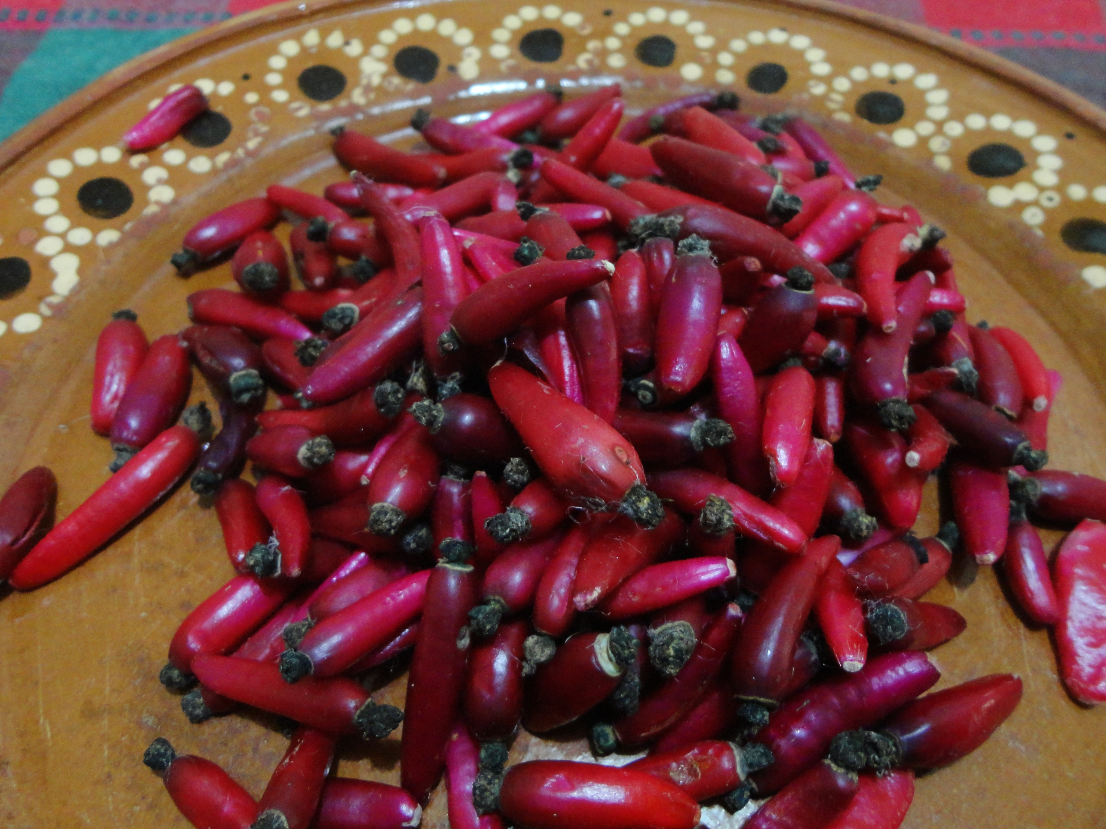 Chilitos (frutos de Mammillaria magnimamma) - Dolores Hidalgo, Guanajuato, México.